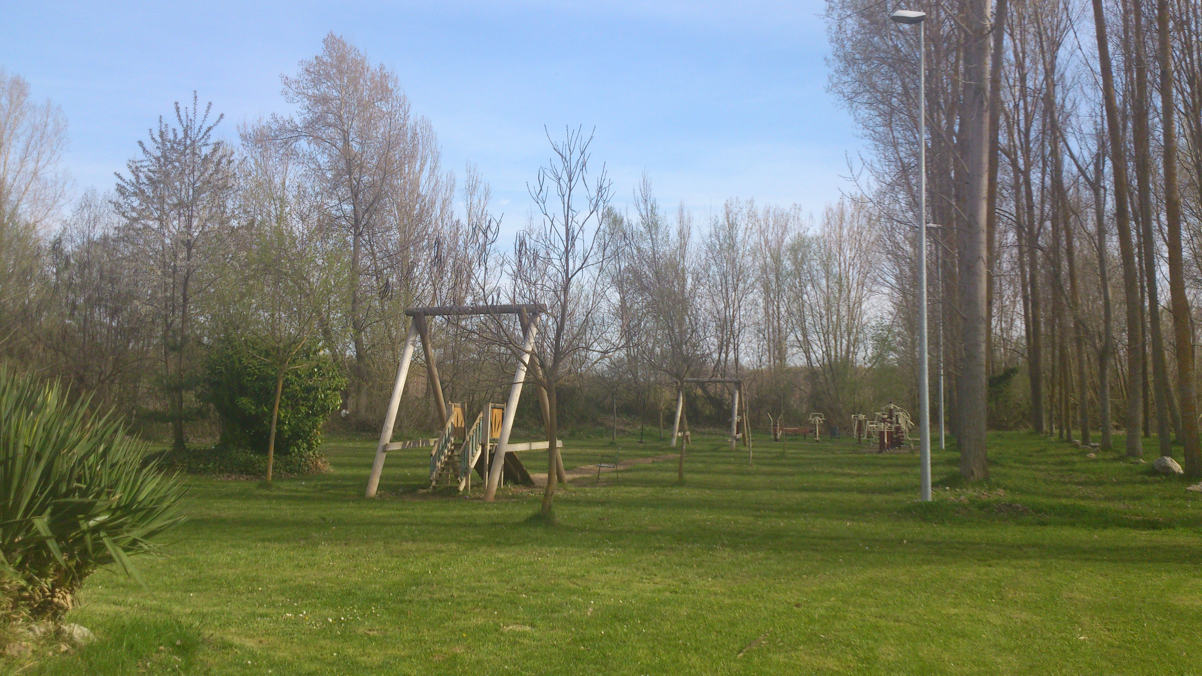 Tirolina en el camping